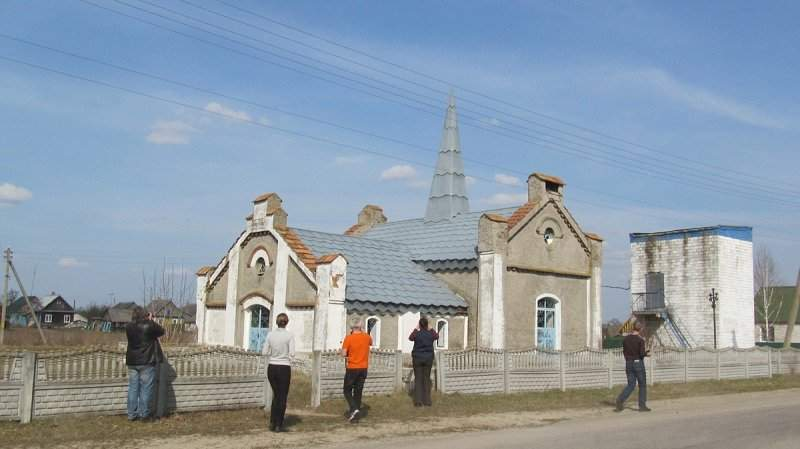 Палескі. Будынак былой лазні